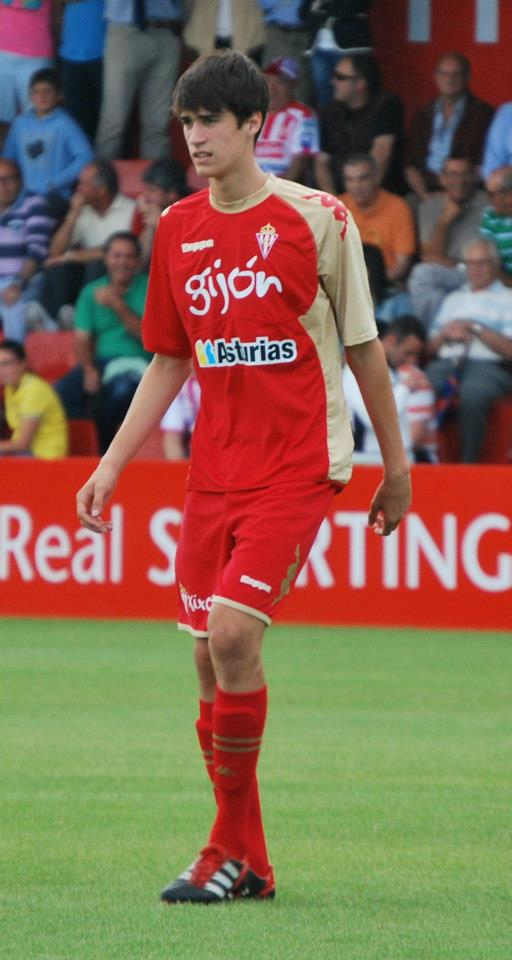 Pablo Pérez